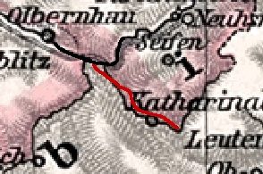 Map of the Schweinitztalbahn, based on Image:Koenigreich_Sachsen_1905.png